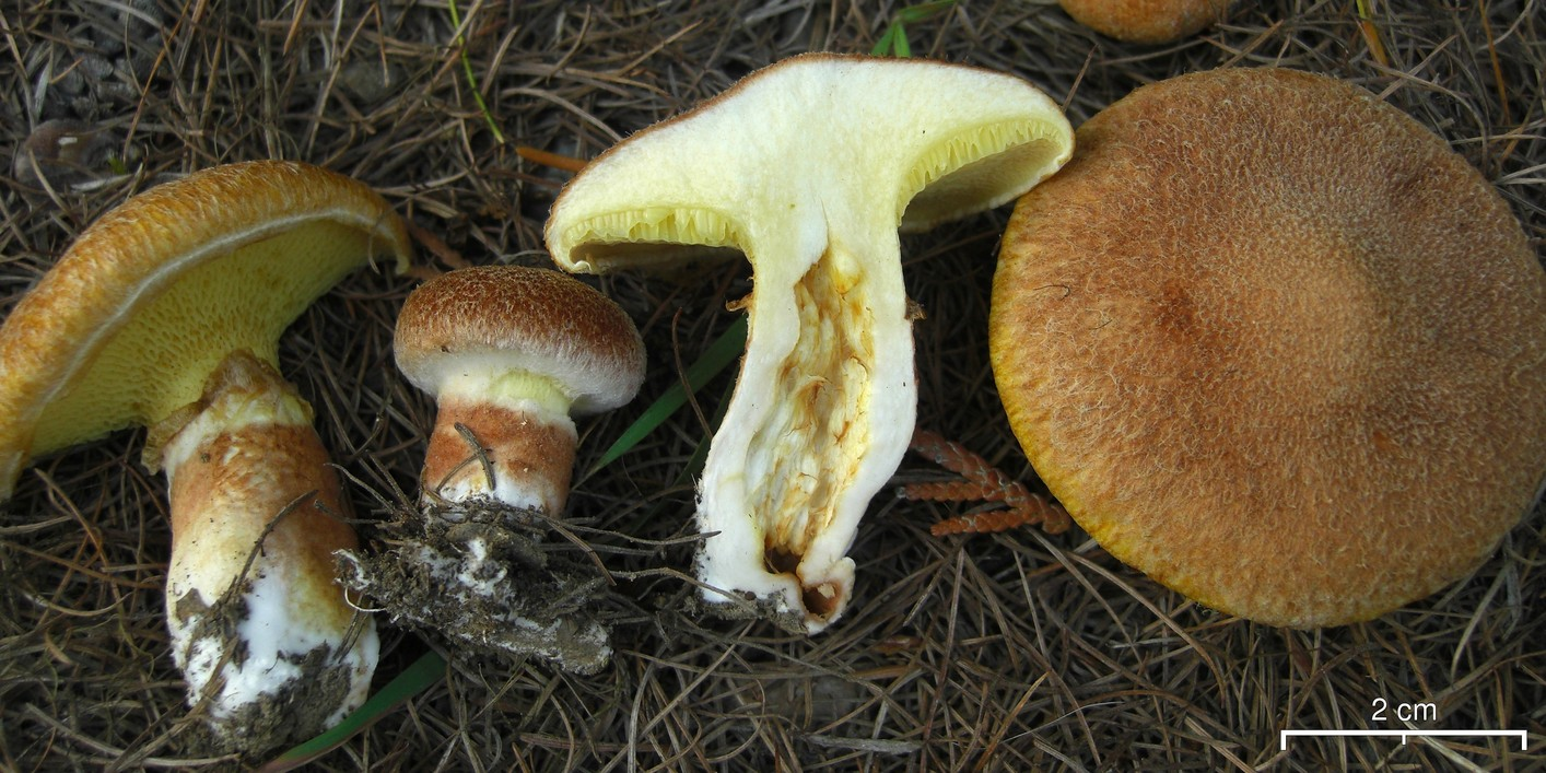 Suillus cavipes 20090929.25 US, MT, Cabinet Mountains, Bull River